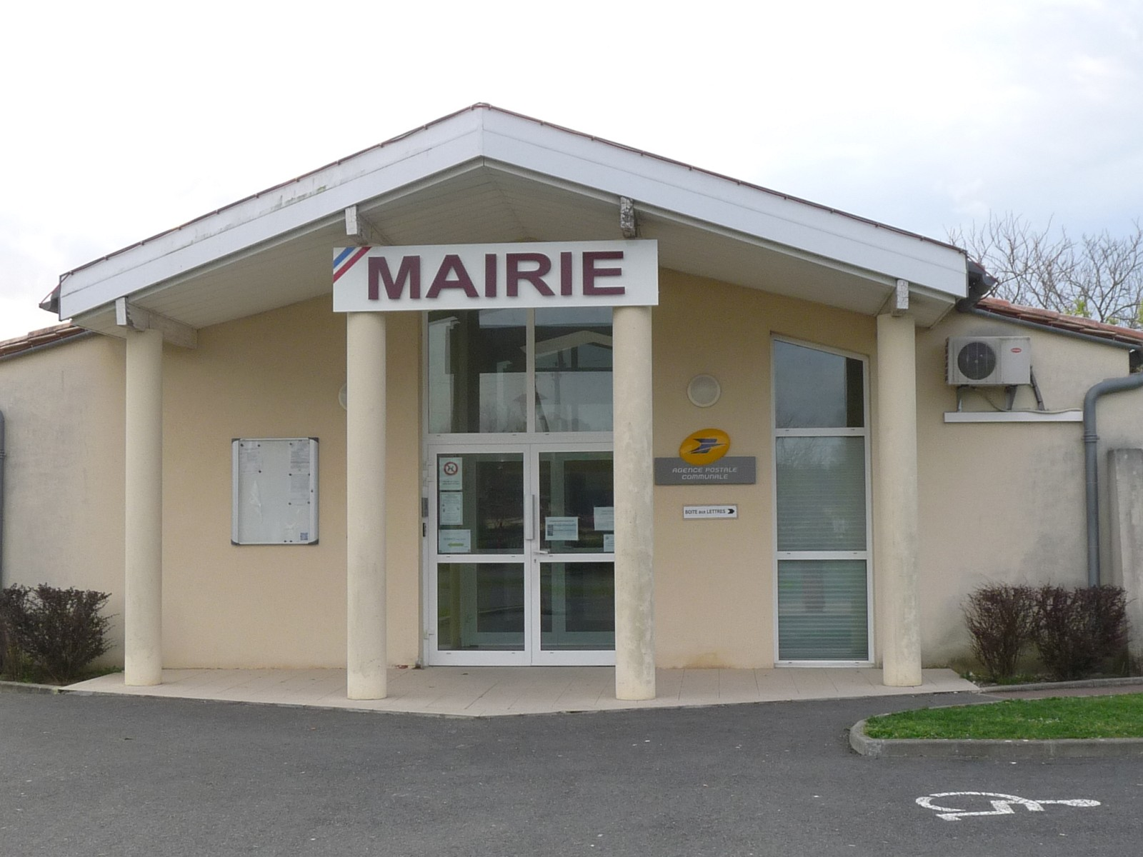 Mairie de Gauriaguet, Gironde, France